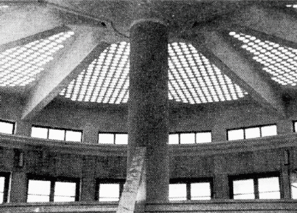 Interno della stazione Mostra della Ferrovia Cumana, Particolare dei pannelli in vetrocemento